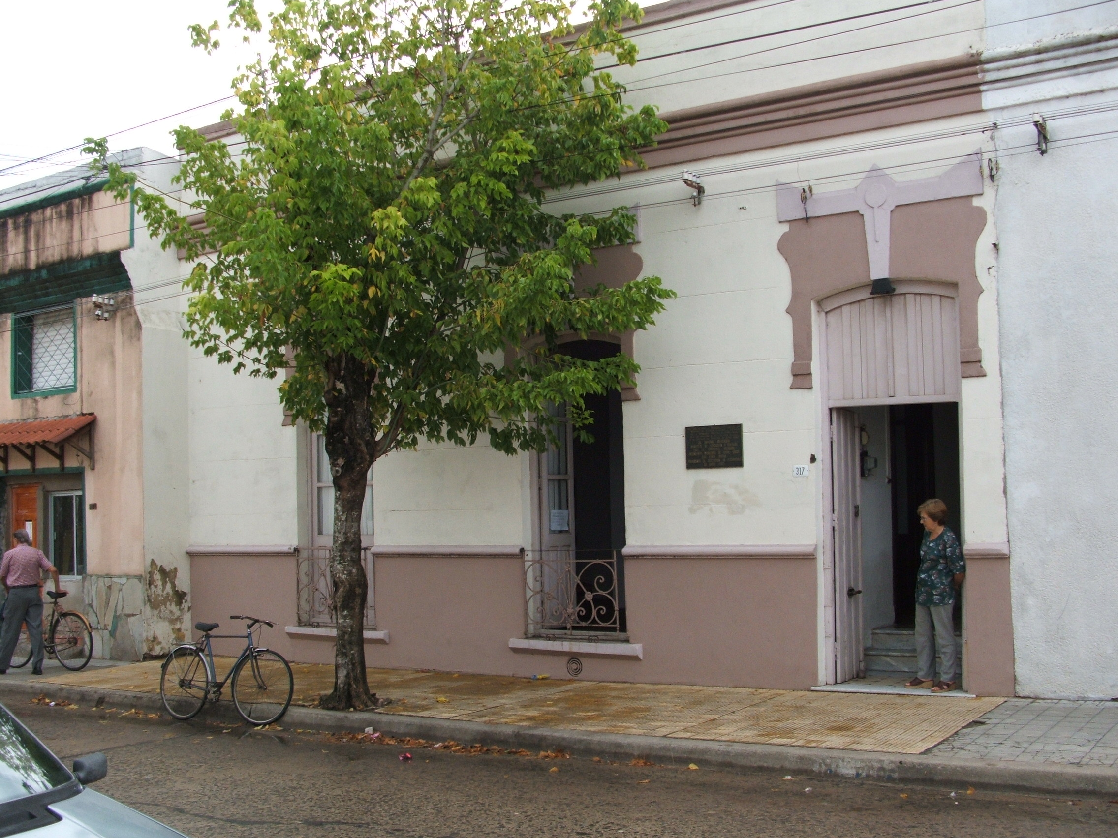 Casa natal de Juana de Ibarbourou, la más importante poetisa uruguaya, en la ciudad de Melo, departamento de Cerro Largo.